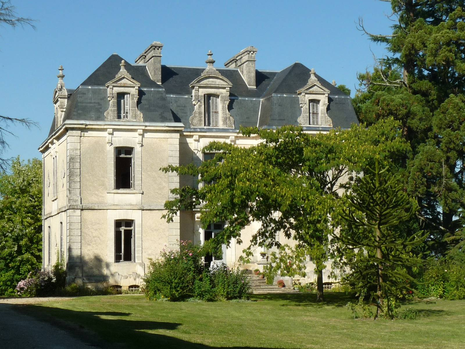 Le château de Beaumont dans le bourg de la Chapelle-Grésignac (24), France .